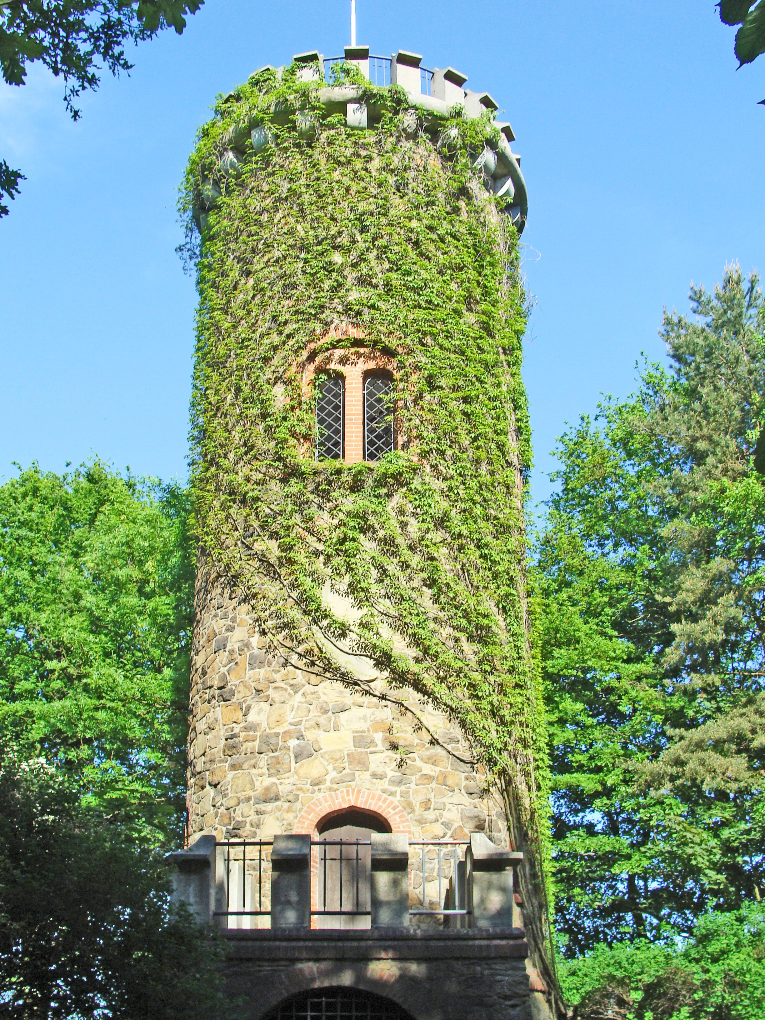 Bismarckturm im Juttapark bei Höfgen/Grimma